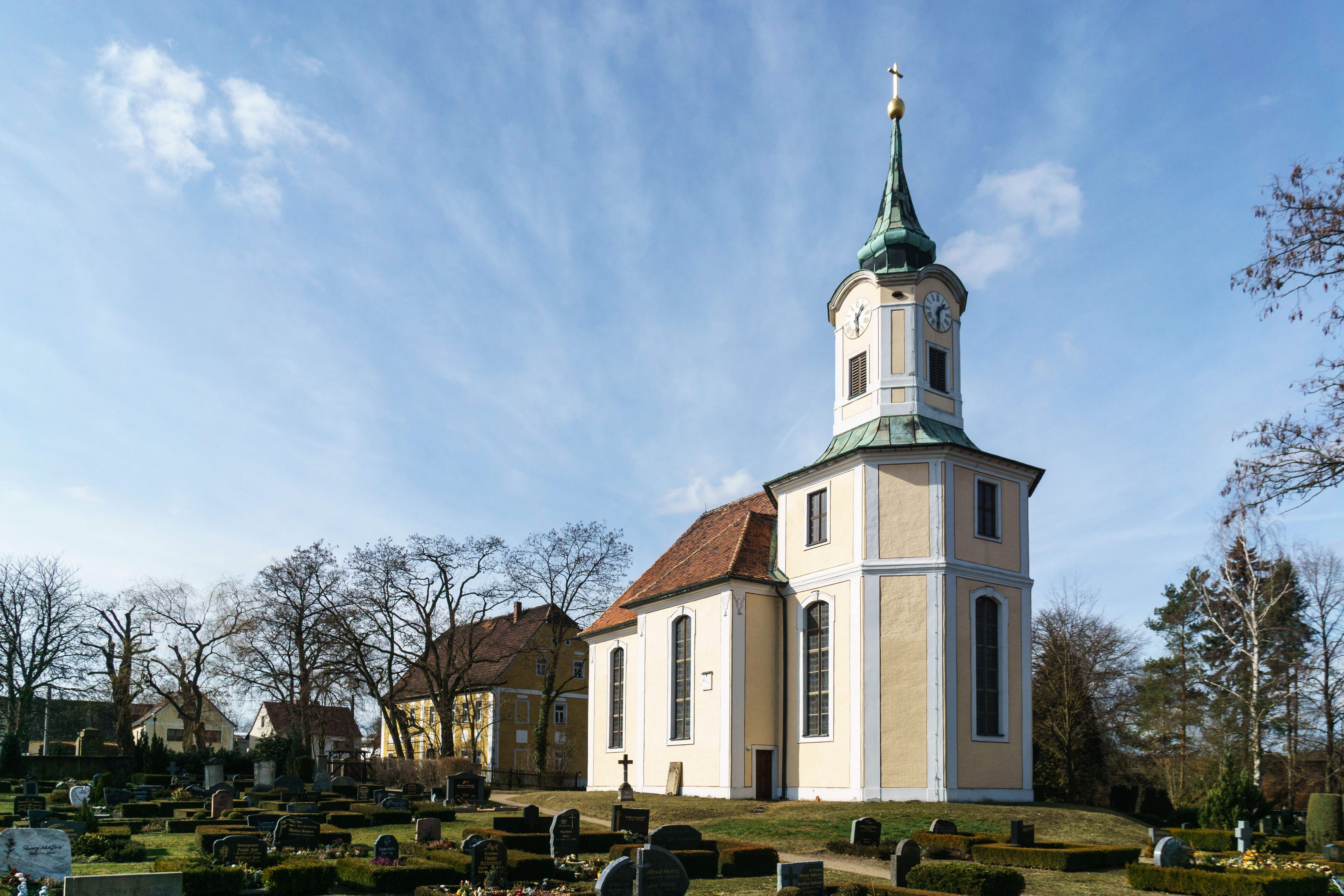 Kirche (George-Bähr-Kirche), Torgauer Straße in Dahlen Stt Schmannewitz